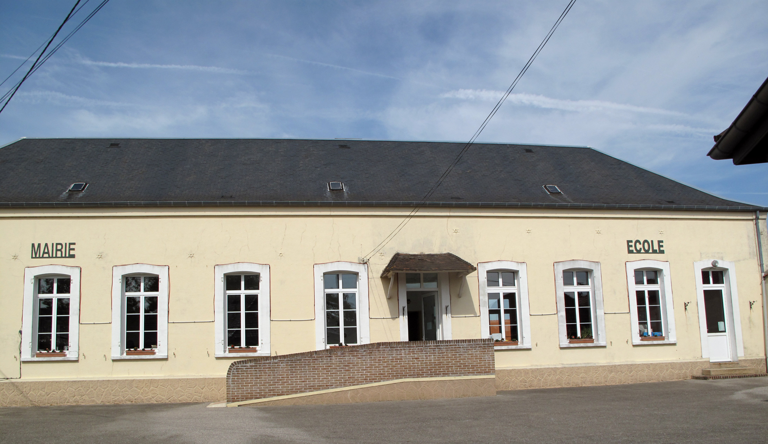 Boisjean mairie et école